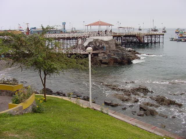 Glorieta de Ilo